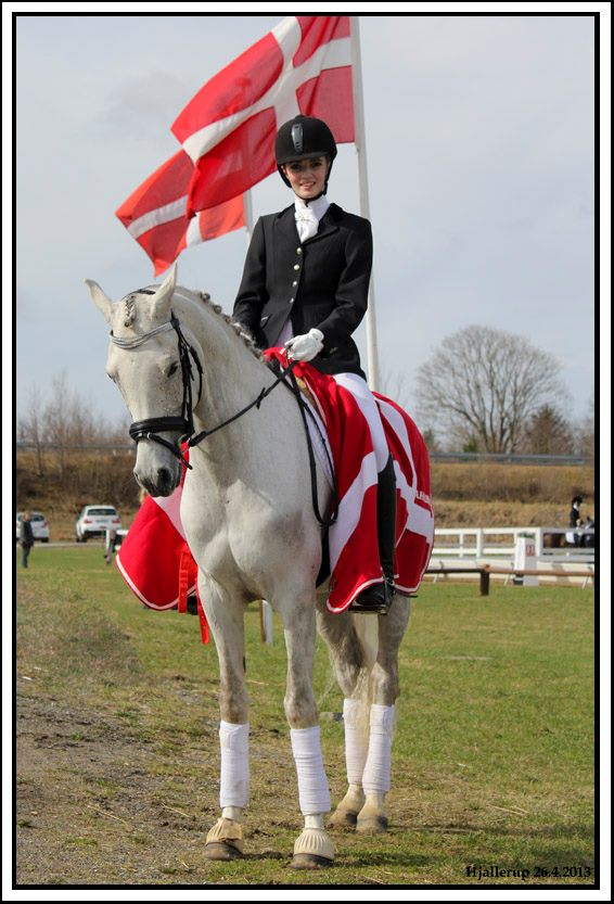 Arabian horse